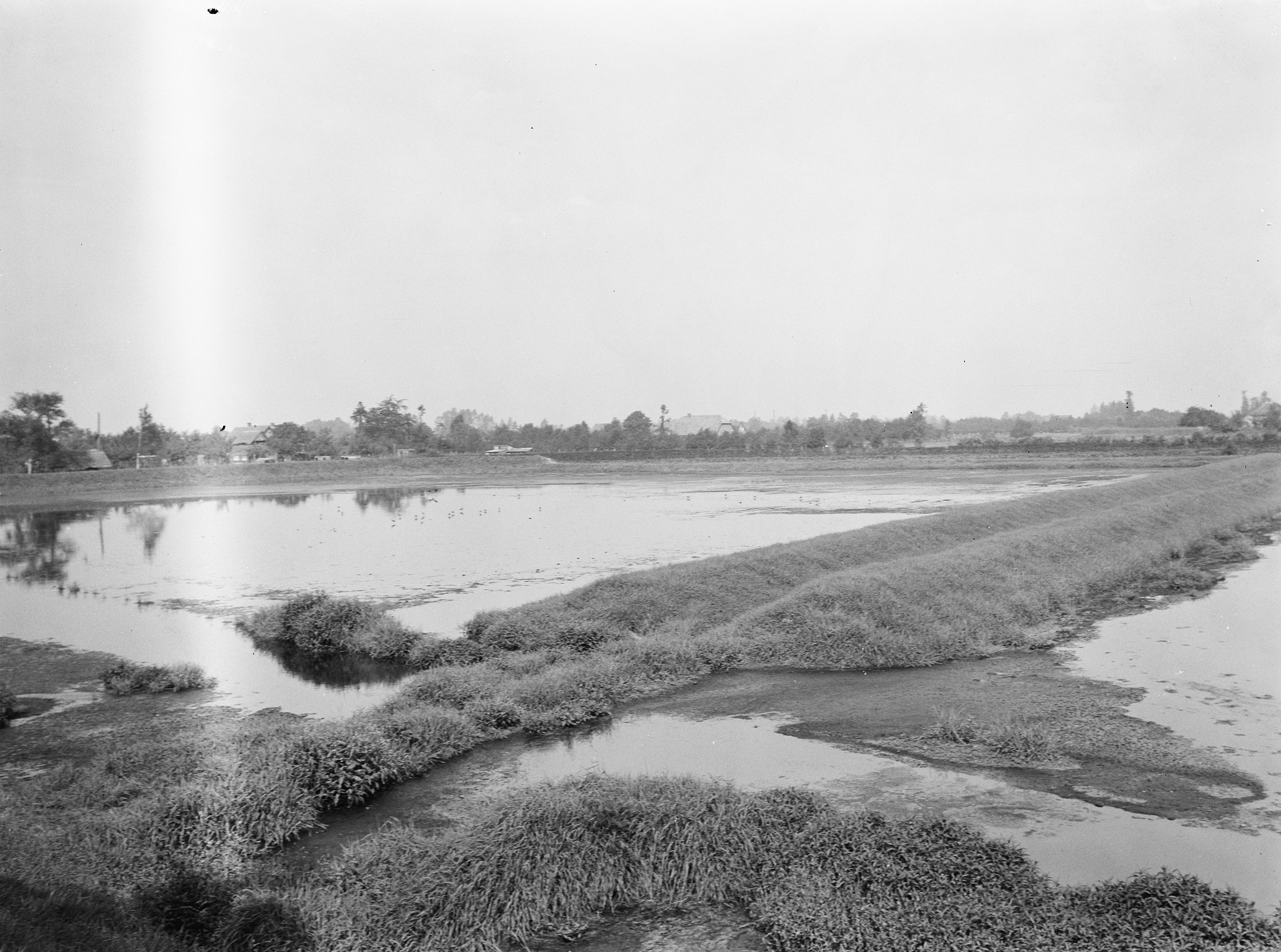 Collectie / Archief : Fotocollectie Nederlandse Heidemaatschappij Reportage / Serie : [ onbekend ] Beschrijving : "Vloeivelden" te Ede Datum : ongedateerd Locatie : Ede Trefwoorden : reiniging afvalwater, verwerken stadsvuil Fotograaf : [onbekend] Auteursrechthebbende : Nationaal Archief Materiaalsoort : Negatief (zwart/wit) Nummer archiefinventaris : bekijk toegang 2.24.06.02 Bestanddeelnummer : 192-1318